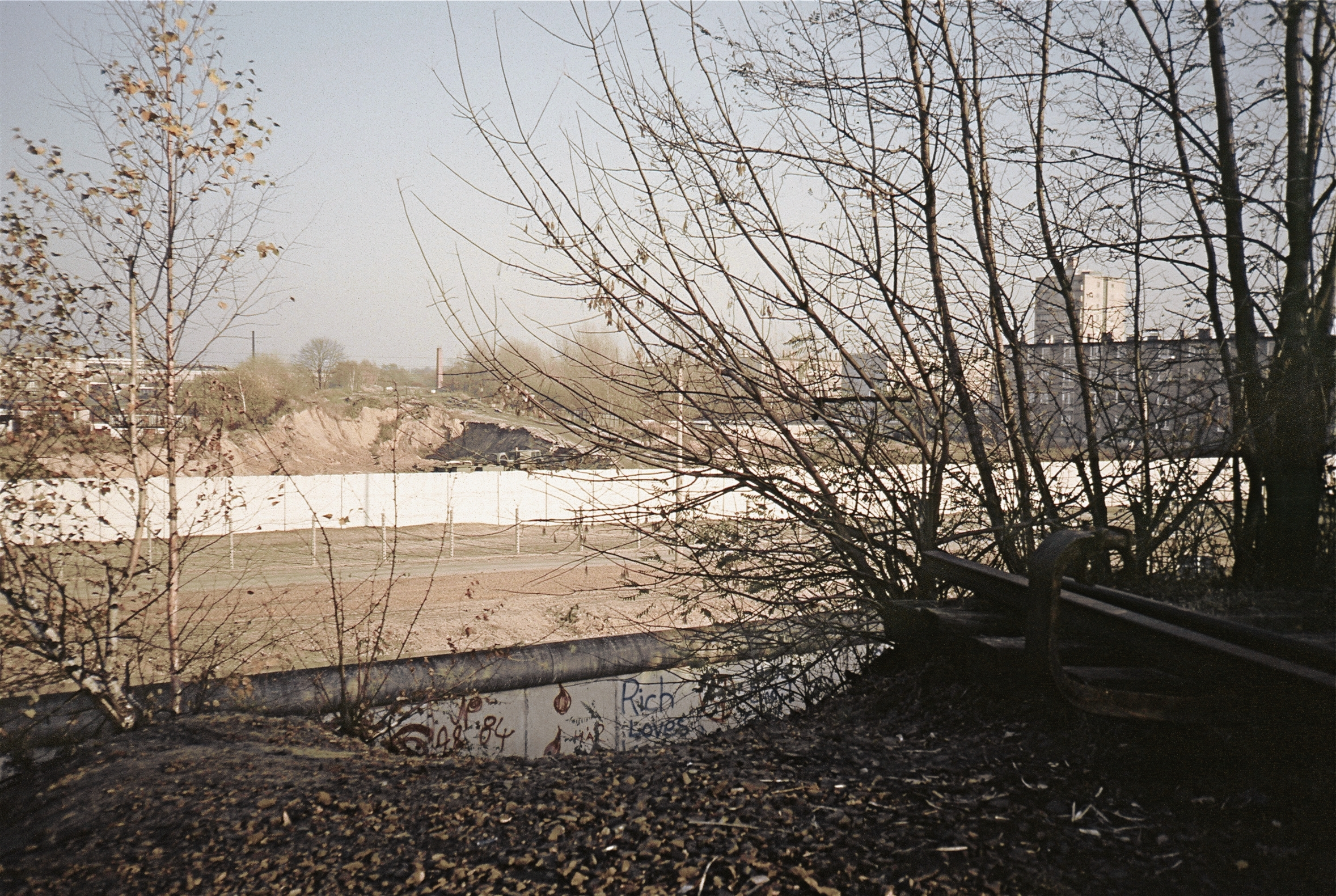 Von der Berliner Mauer unterbrochene Verbindungsbahn Baumschulenweg–Neukölln. Der Fotograf befindet sich in West-Berlin (Neukölln). Die abgebildeten Gebäude befinden sich in Ost-Berlin.